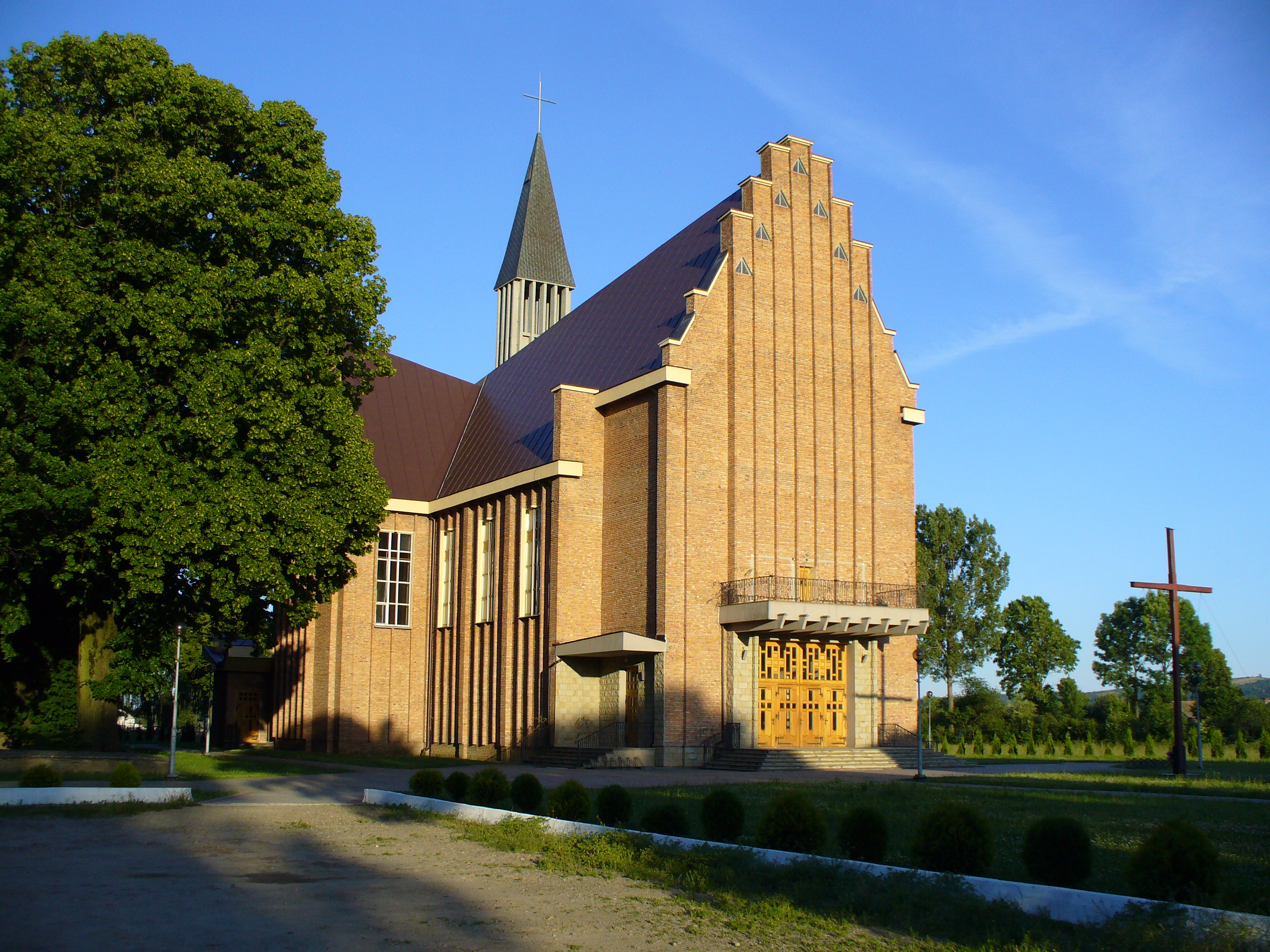 Besko nowy kościół